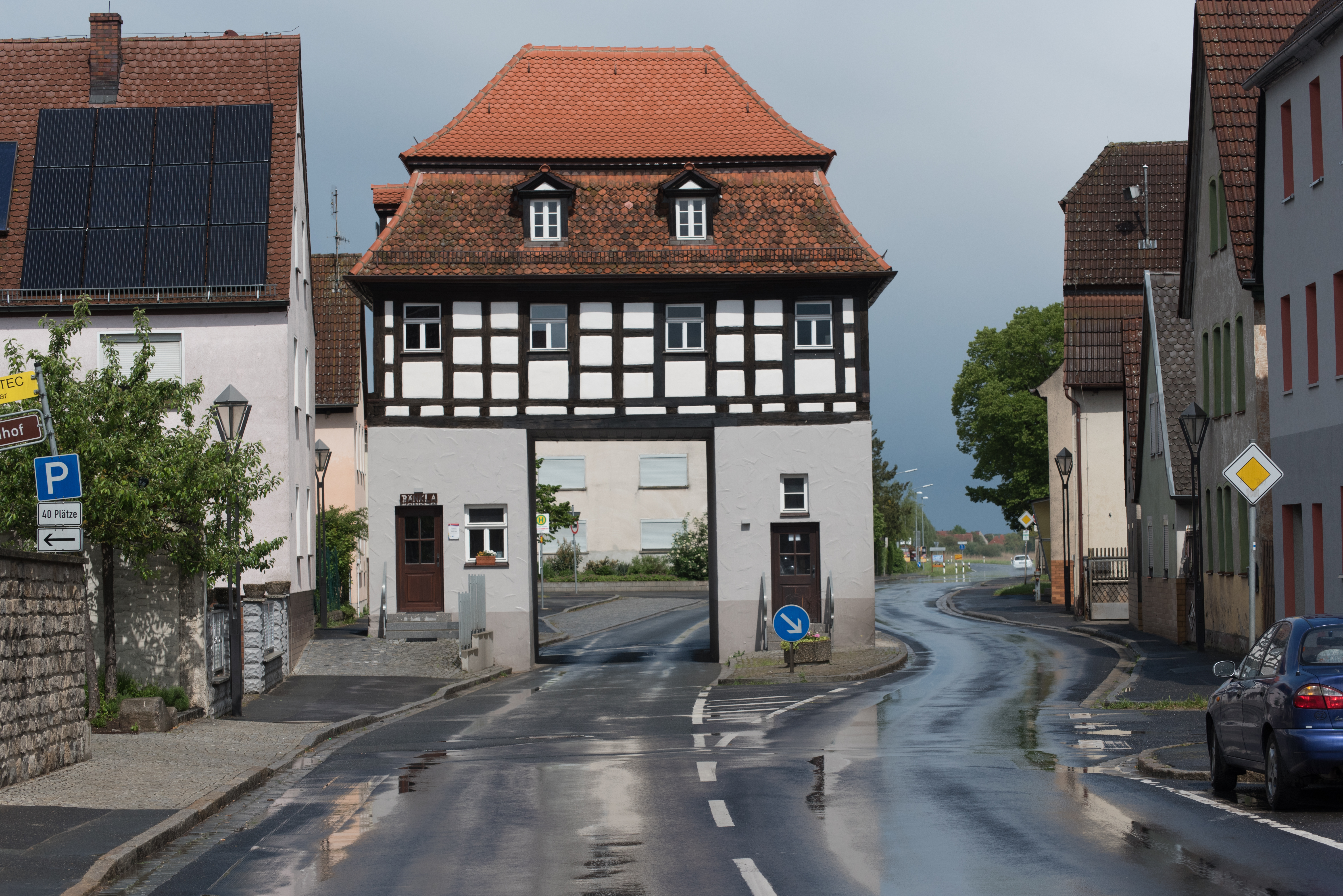 Uehlfeld, Hauptstraße 55